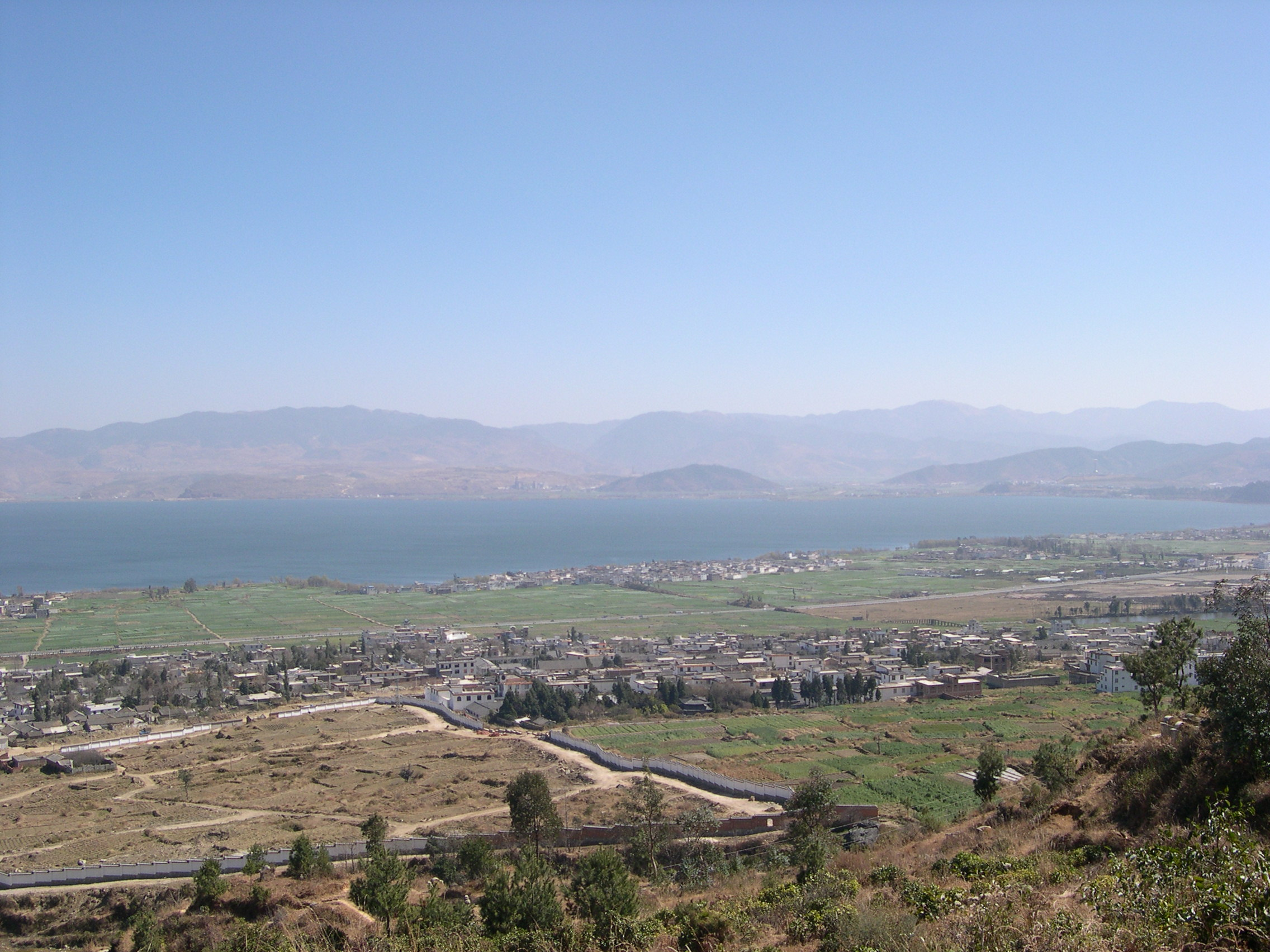 中文（中国大陆）: 太和城遗址及太和村